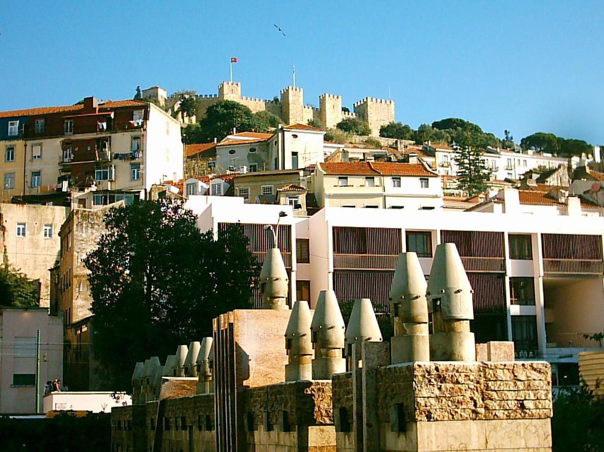 Castelo de São Jorge foto feito do Largo do Martim Moniz em Lisboa